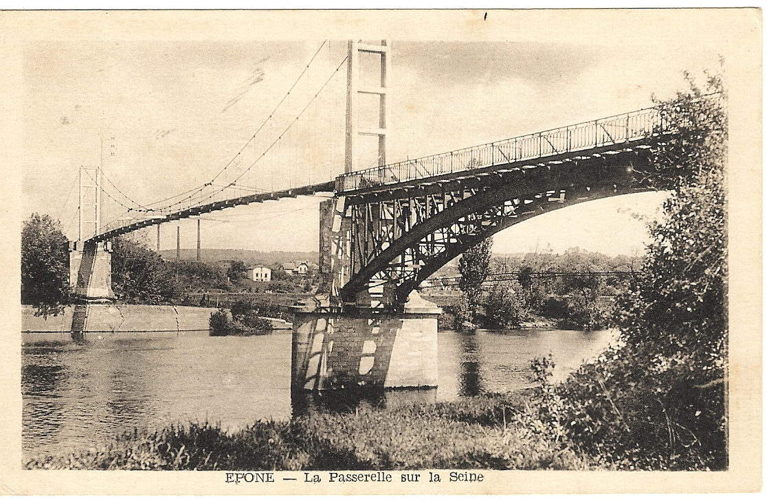 Passerelle piétonnière en bois construite sur le pont de Rangiport (entre Épône et Gargenville, Yvelines) en 1941.